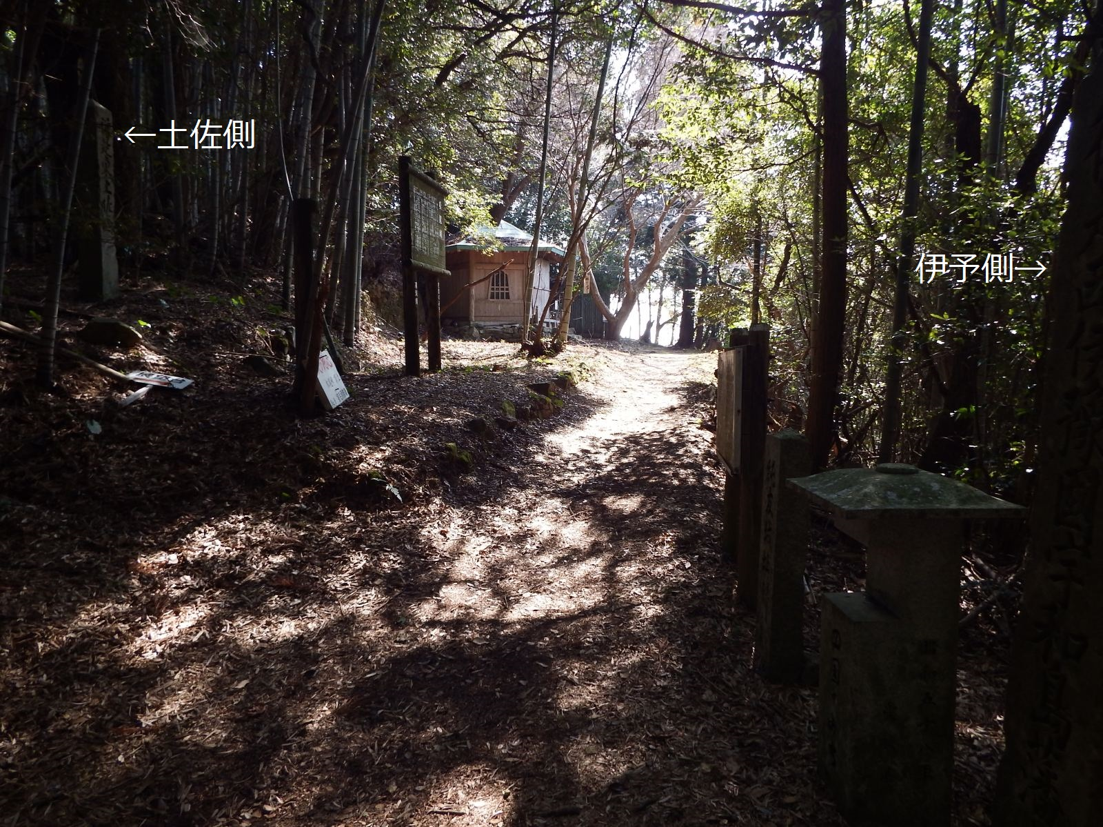 松尾峠（逆打ち方向より）